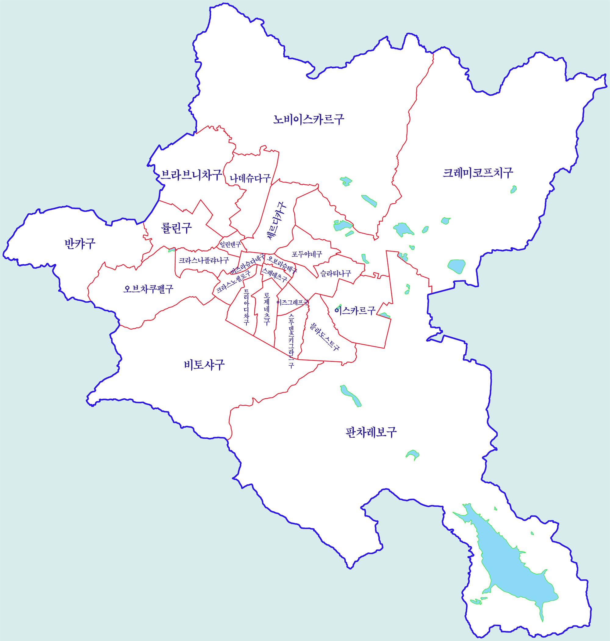 항가리스도 소피아시 행정구역